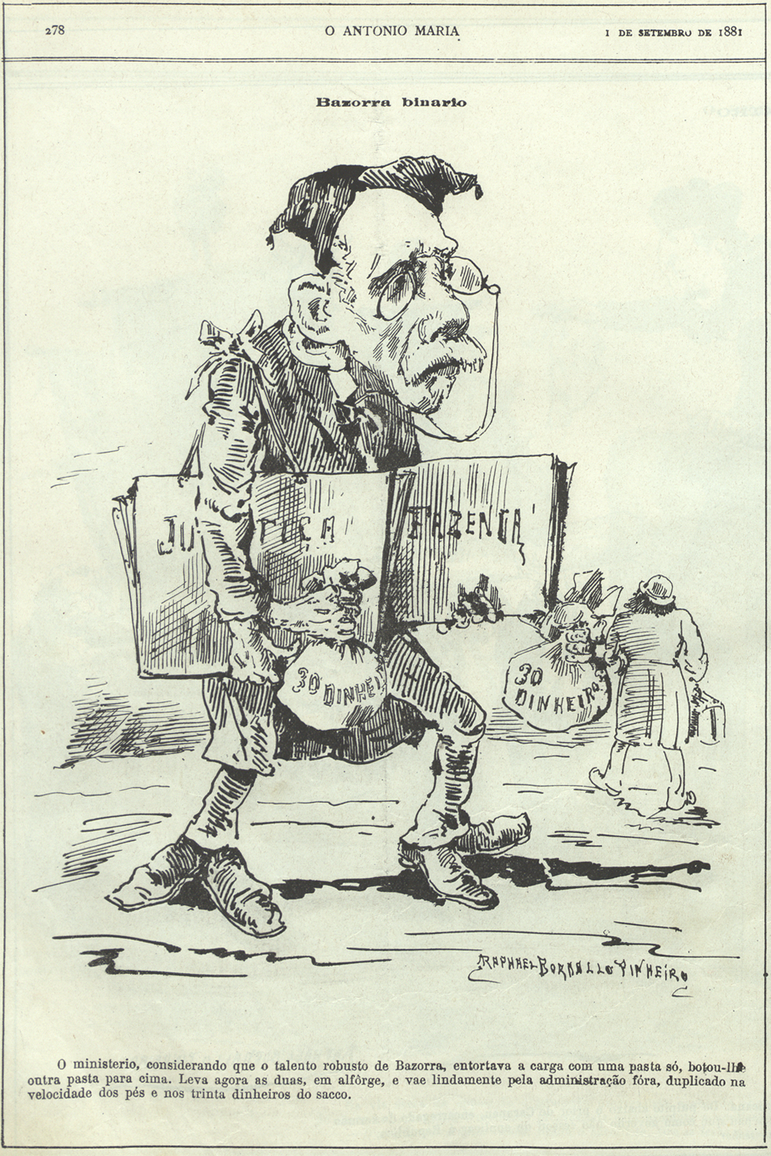 Caricatura do ministro da Justiça e da Fazenda António José de Barros e Sá